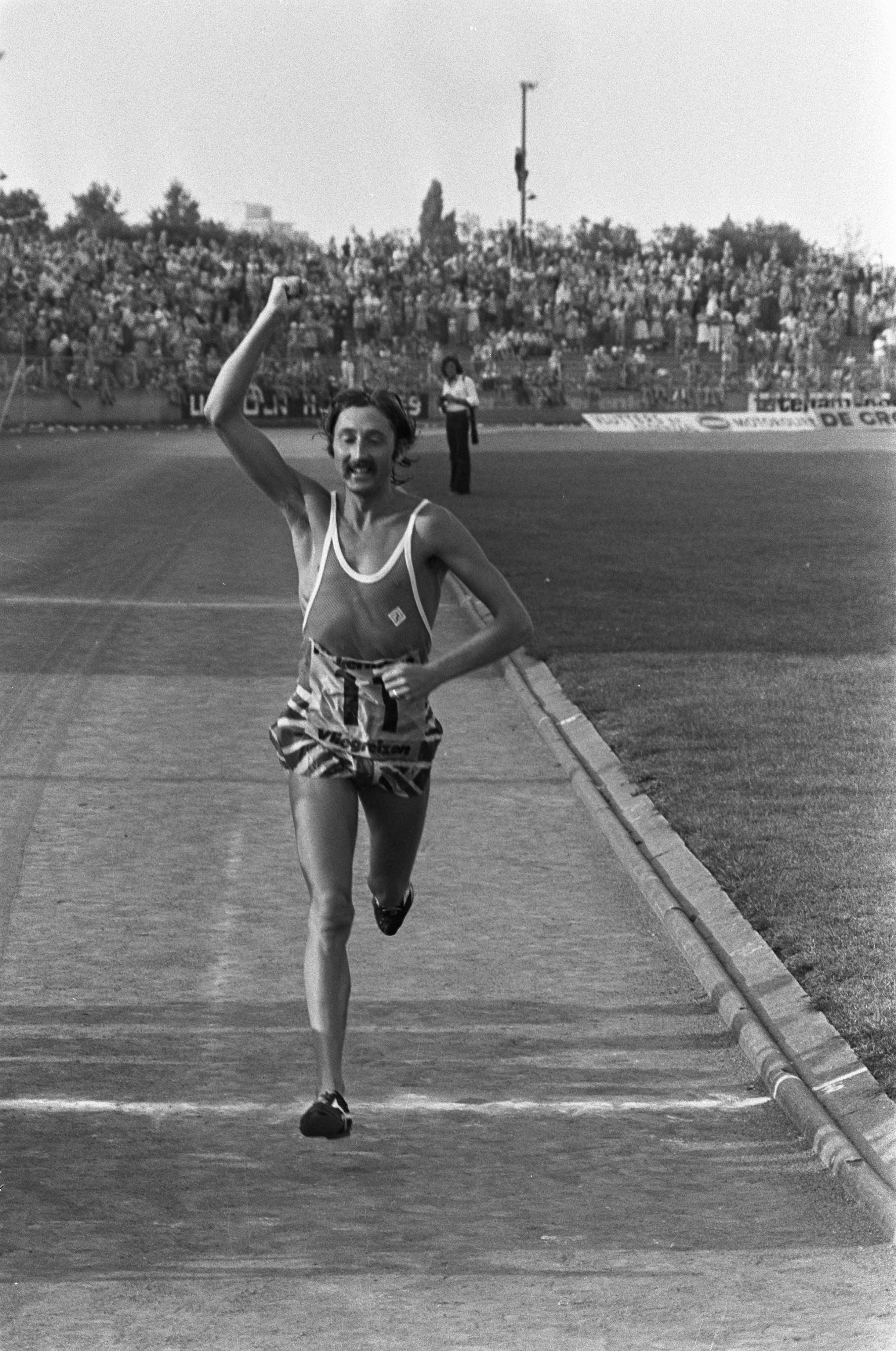 Collectie / Archief : Fotocollectie Anefo Reportage / Serie : De Marathon van Enschede 1975 Beschrijving : De kampioen Ron Hill gaat juichend over de finish Datum : 31 augustus 1975 Locatie : Enschede, Overijssel Trefwoorden : hardlopen, marathon Persoonsnaam : Hill, Ron Fotograaf : Fotograaf Onbekend / Anefo Auteursrechthebbende : Nationaal Archief Materiaalsoort : Negatief (zwart/wit) Nummer archiefinventaris : bekijk toegang 2.24.01.05 Bestanddeelnummer : 928-1297